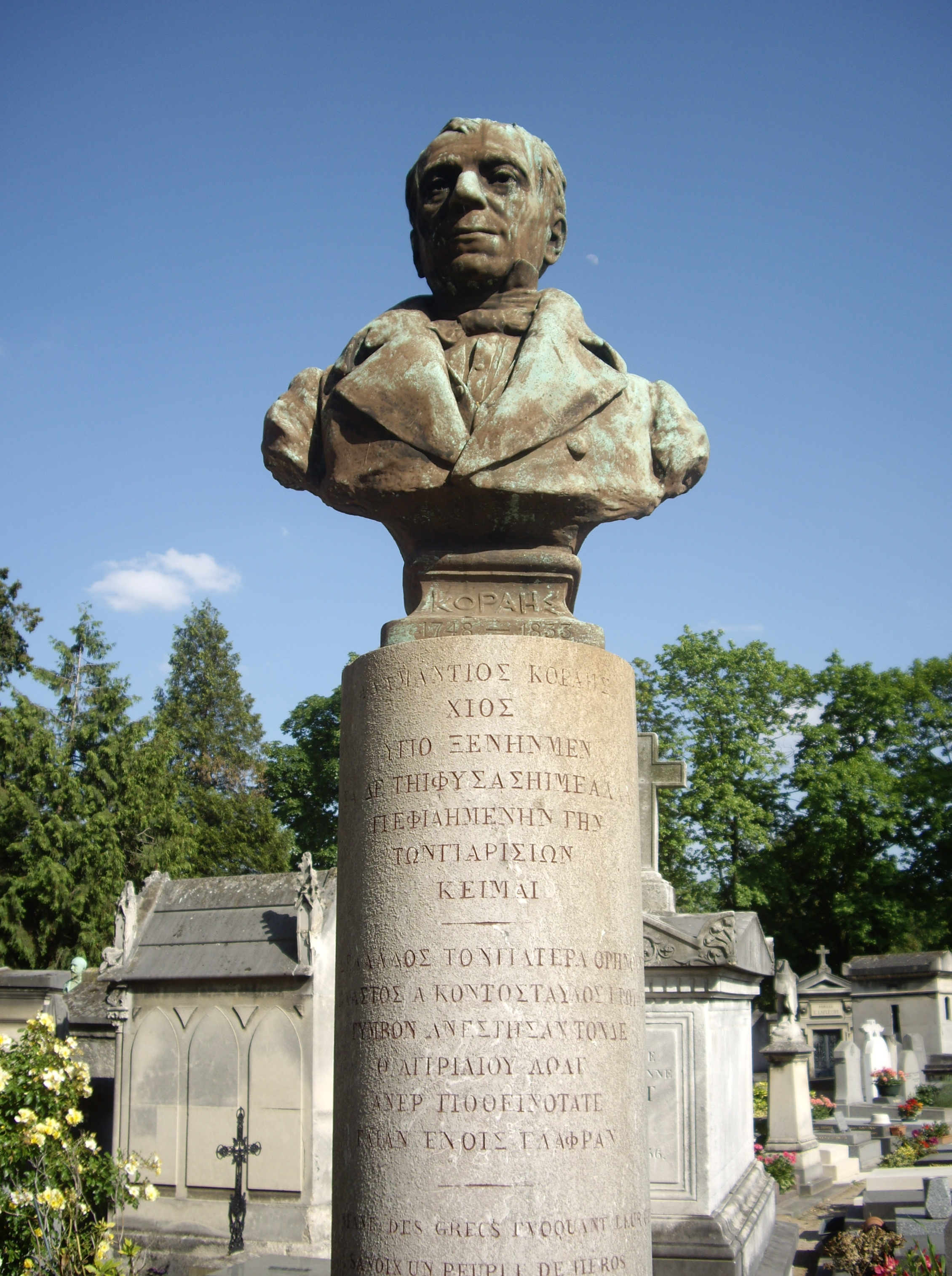 Cénotaphe d'Adamántios Koraïs, cimetière du Montparnasse, division 2. La sépulture de Koraïs fut transférée au Cimetière Premier d'Athènes en 1877. La colonne et le buste surmontant son cénotaphe furent érigés et inaugurés en 1895. Koraîs avait composé lui-même l'épitaphe inscrite sur la colonne. Traduction : « Ci-gît Adamantius Coray, de Chios. Une terre étrangère me couvre, mais cette terre de Paris, je la chérissais à l'égal de mon pays natal, la Grèce. » Voir à ce sujet l'article du Journal des débats sur « le buste de Coray » en date du 7 avril 1895